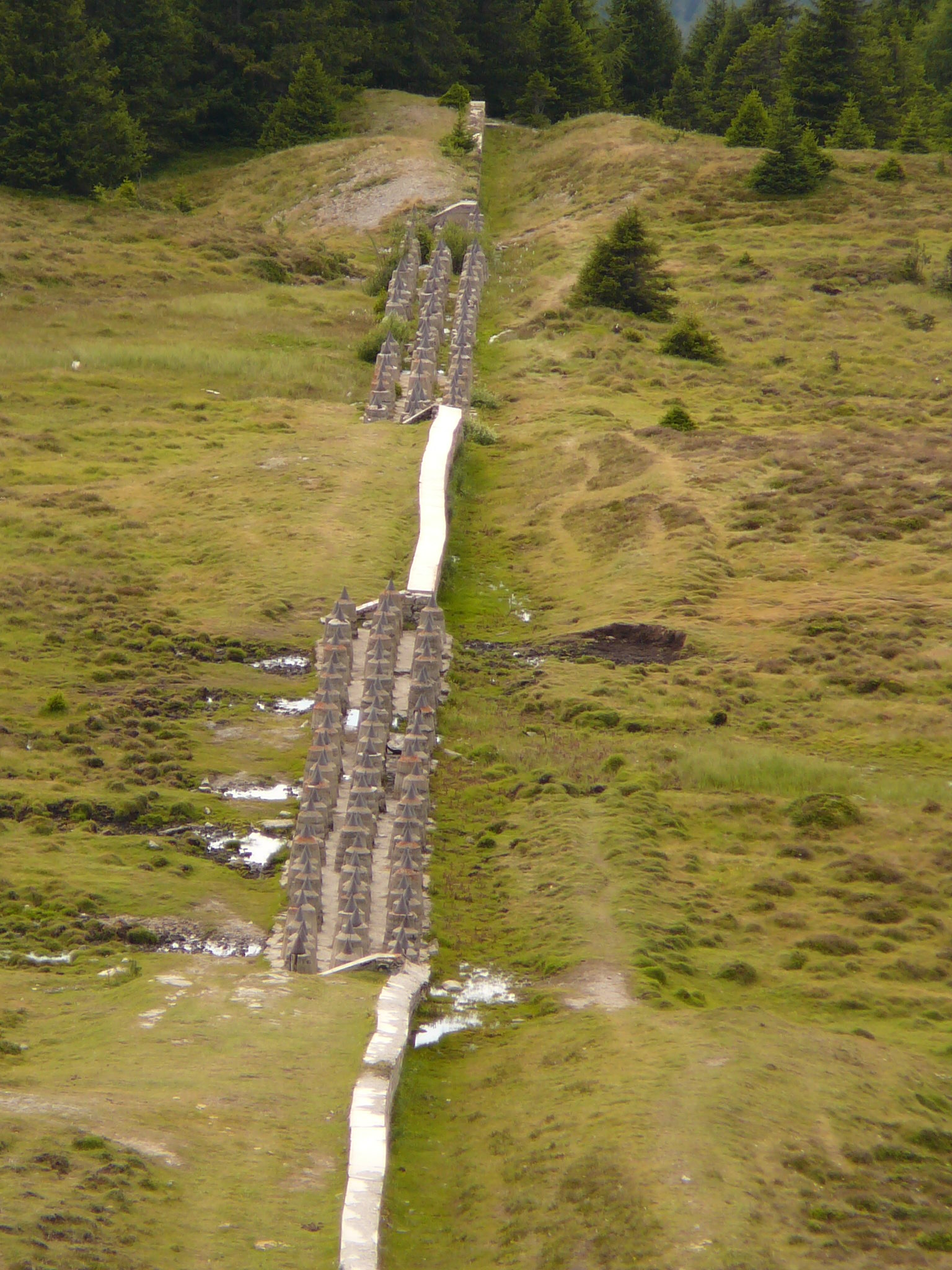 Pian dei morti